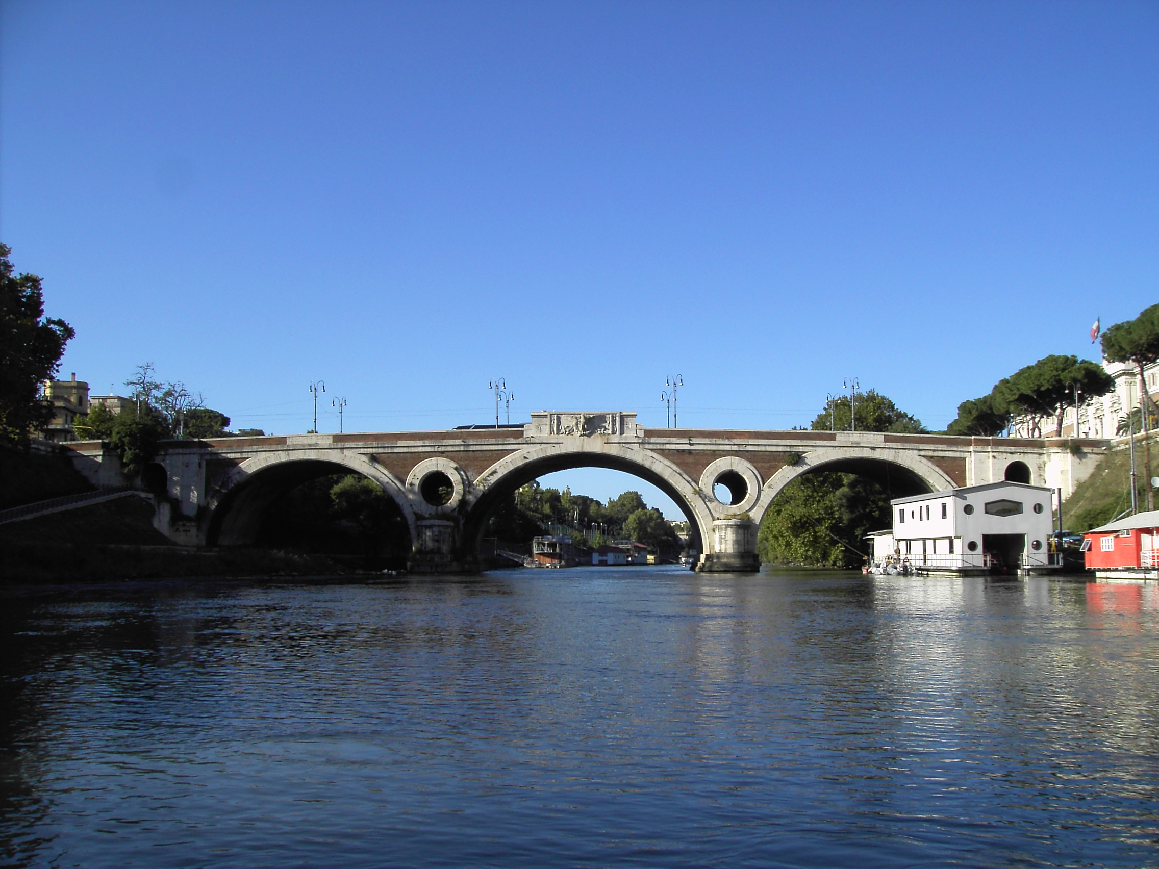 Roma, Ponte Matteotti